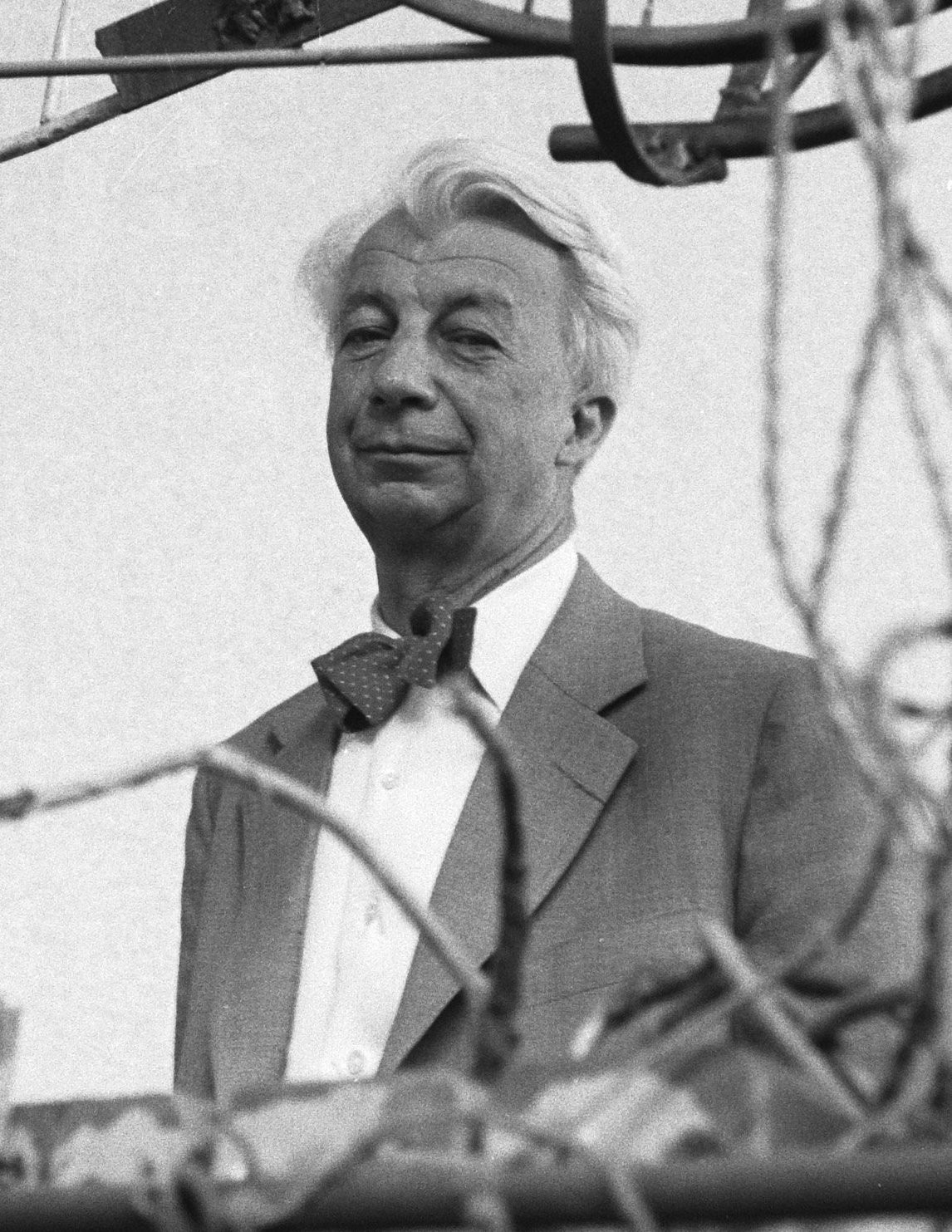 Bewogen beweging in Stedelijk Museum Dhr. Sandberg